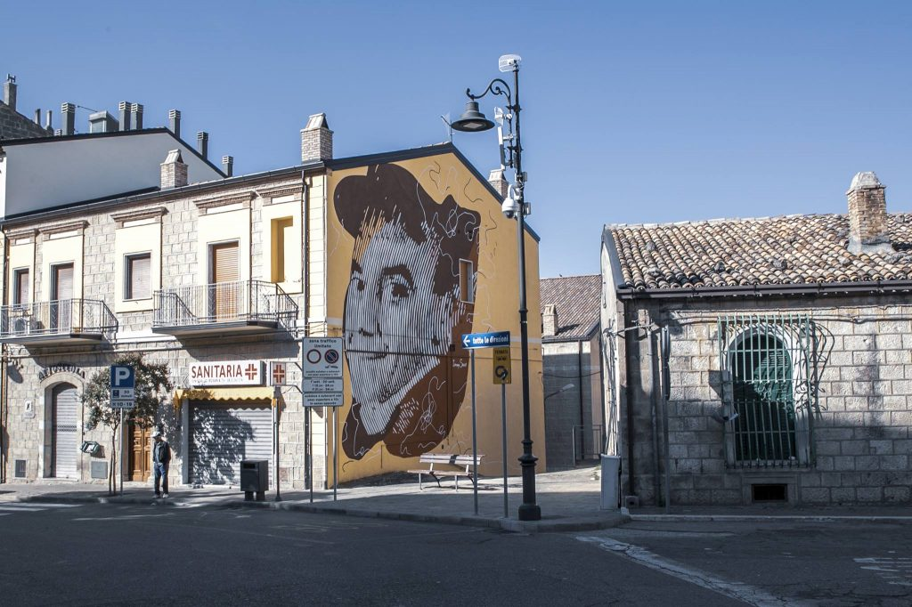 aspettando Jimmy Savo a Sigliano "Capitale per un giorno" nell'ambito di "Matera, Capitale della Cultura 2019"